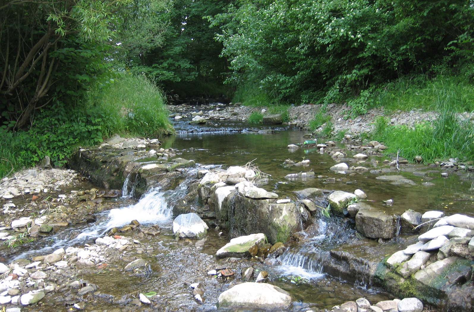 Ústí potoka Kychová do Vsetínské Bečvy na Huslenkách - Bařinách